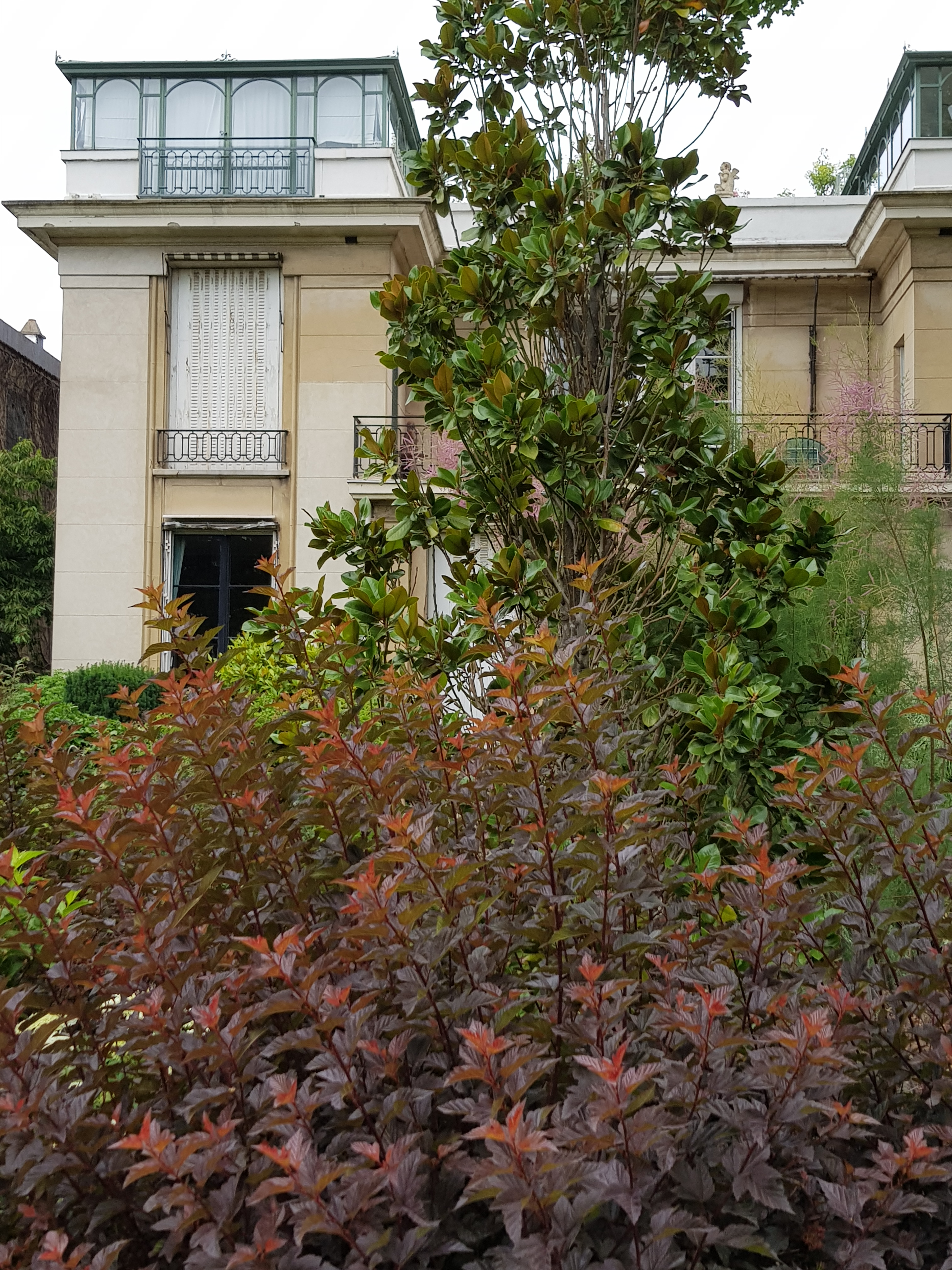 5, villa de Madrid, Neuilly-sur-Seine, 92200 (vu du parc de la Folie Saint-James).